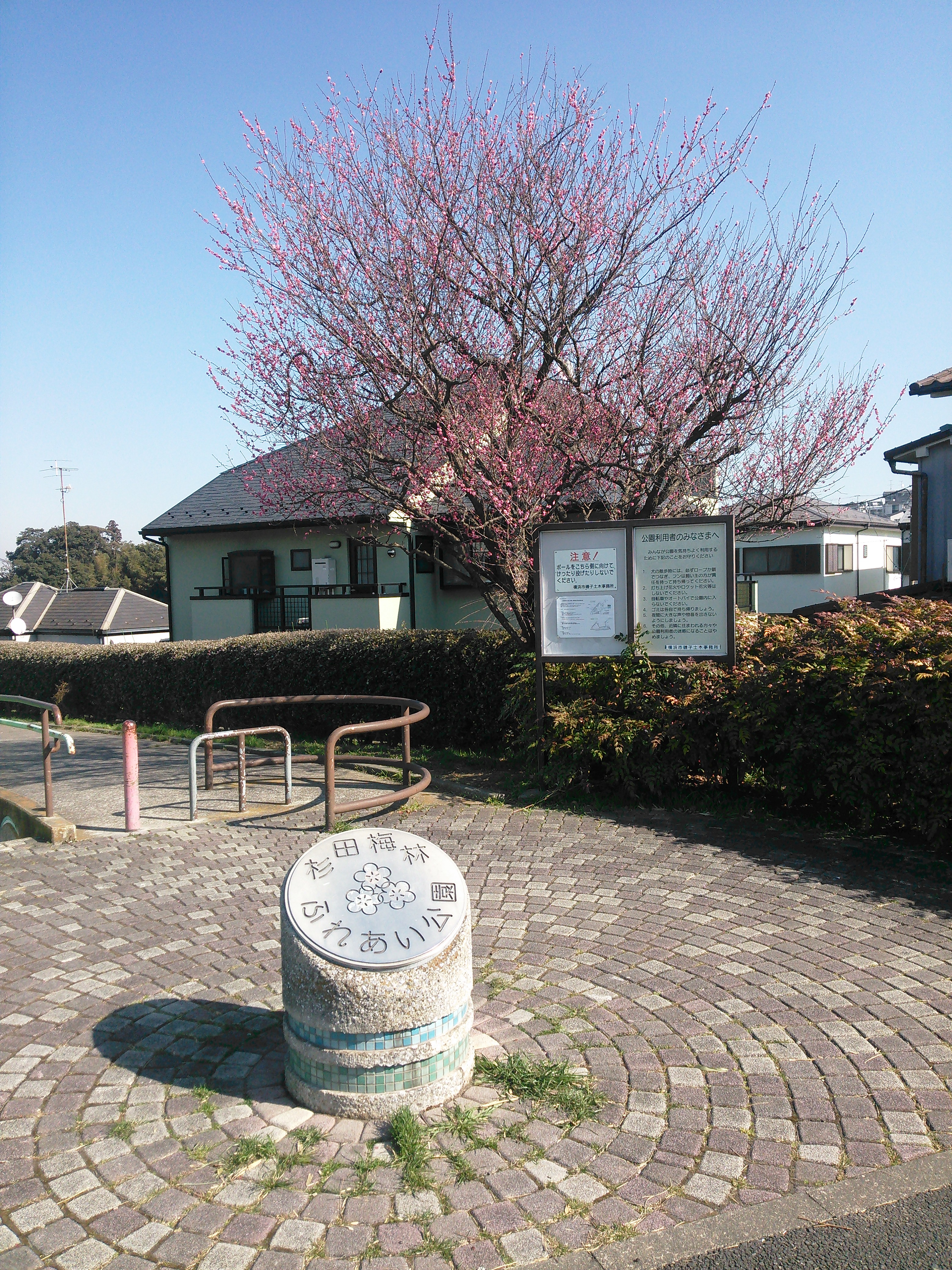 横浜市磯子区杉田、杉田梅林ふれあい公園